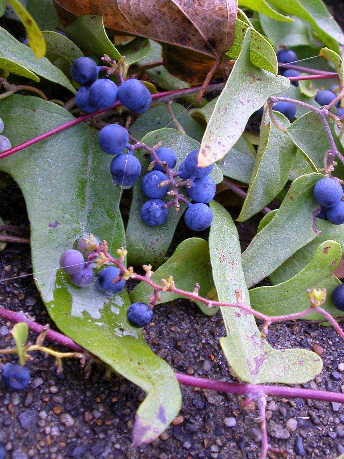 Cocculus orbiculatus(アオツヅラフジ)